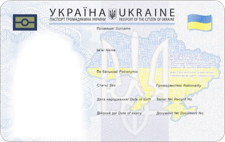 Паспорт громадянина України (біометричний), лицьовий бік